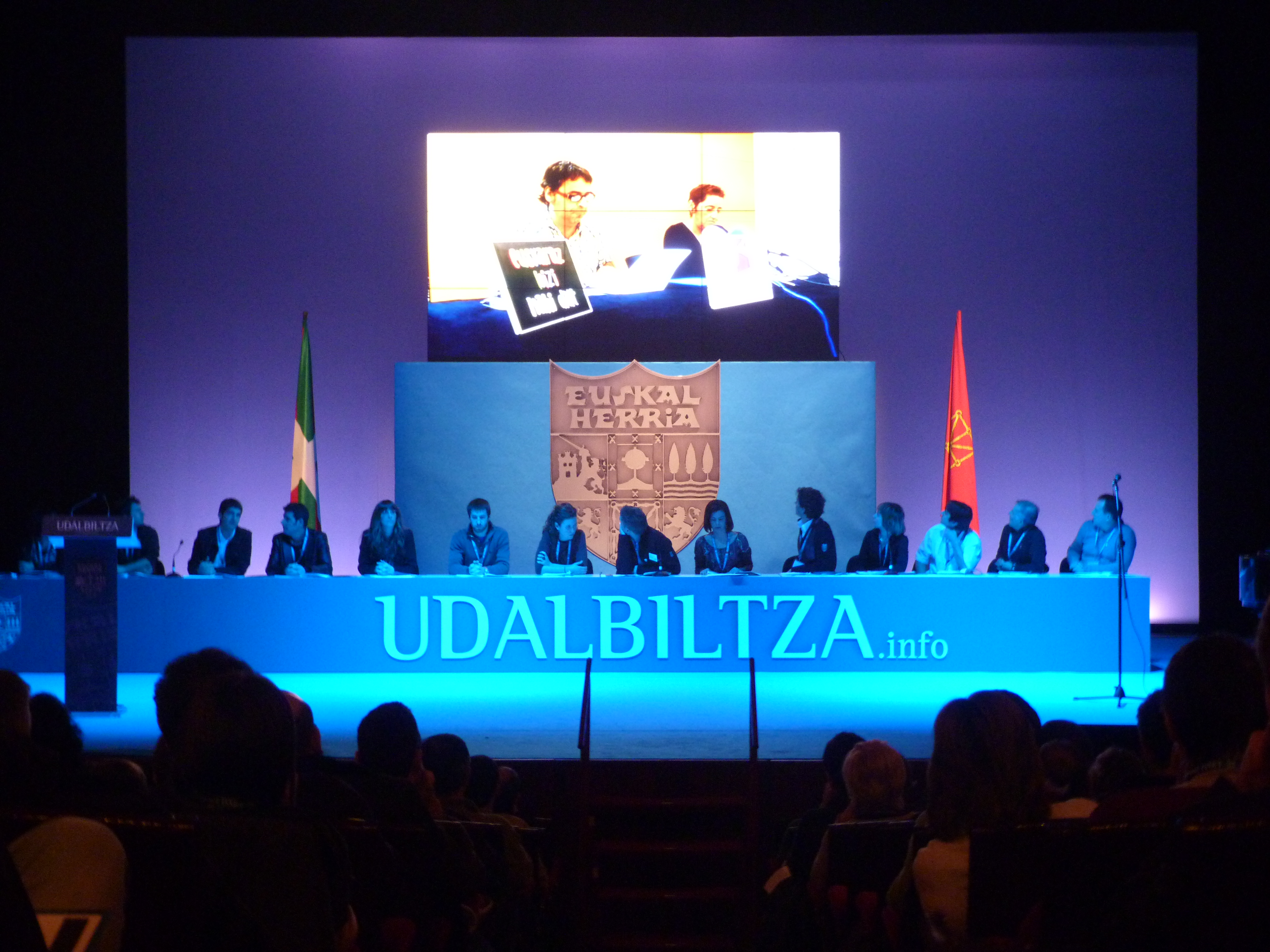 2013ko martxoaren 2a, Donostiako Viktoria Eugenia antzokia. (2 de marzo del 2013, Donostia, teatro Victoria Eugenia)